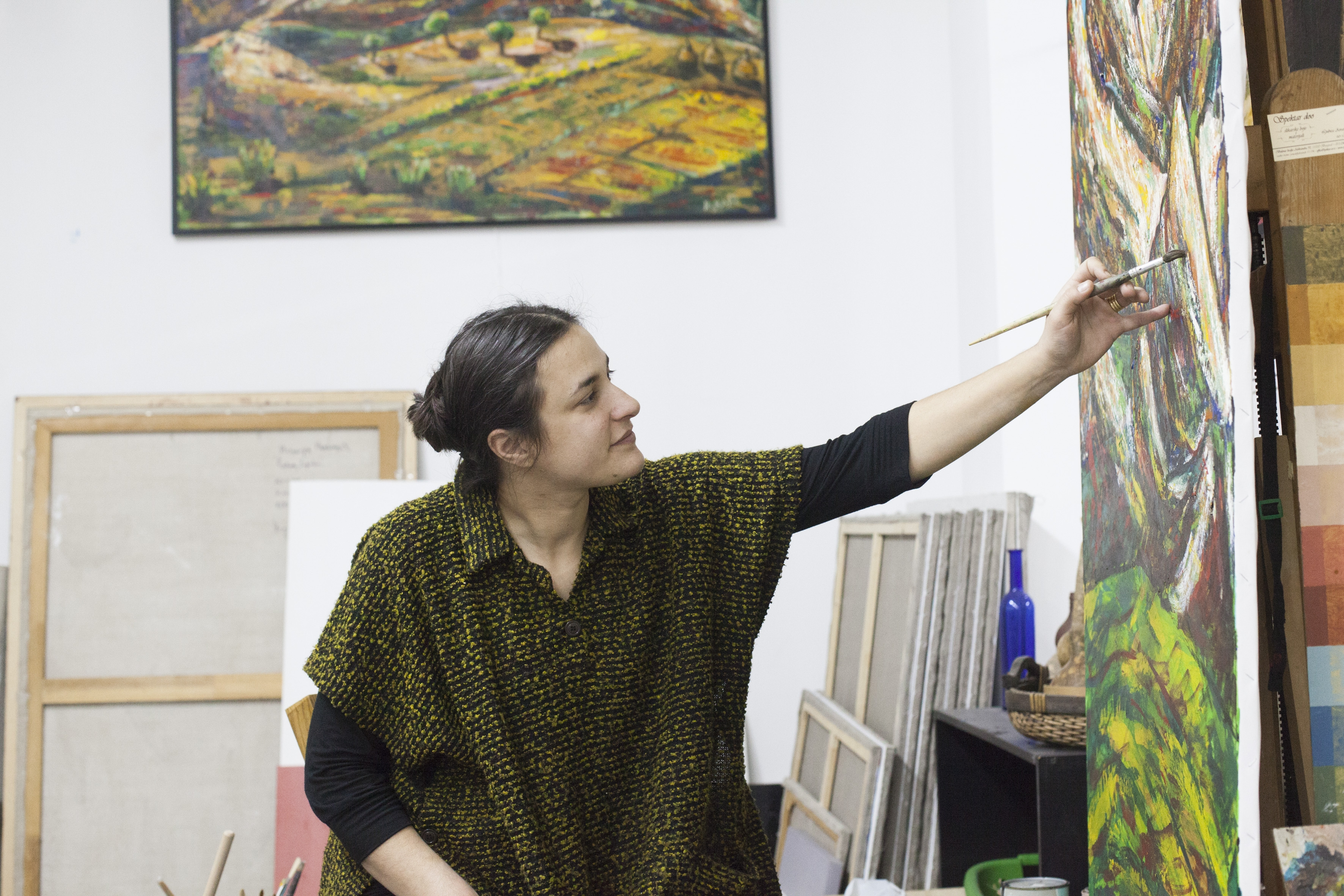 Isidora Ivanović (Beograd, 1983) srpski slikar (Po odobrenju Isidore Ivanović)